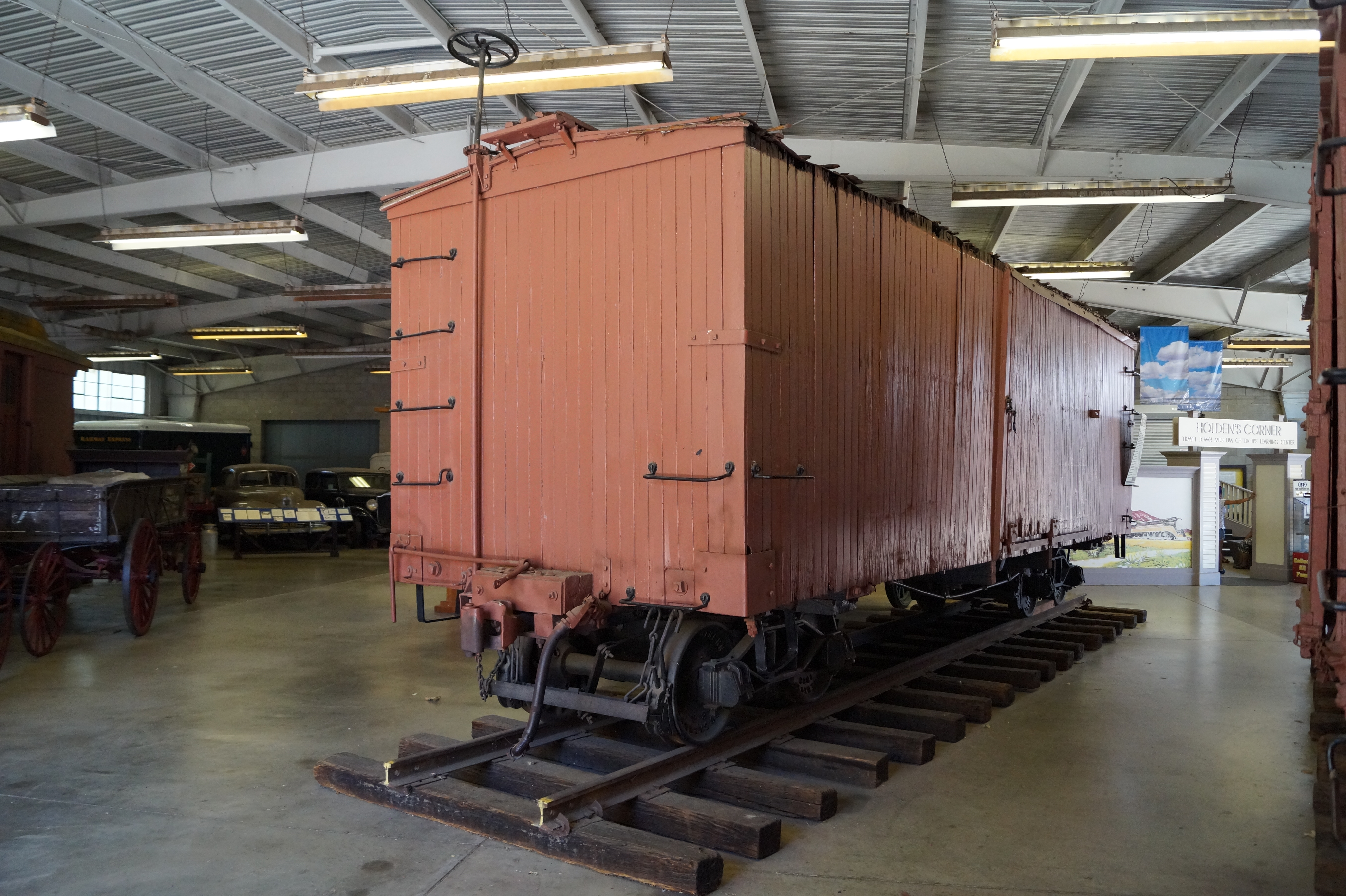 Travel Town Museum is a transport museum dedicated in the northwest corner of Los Angeles, California's Griffith Park. The history of railroad transportation in the western United States from 1880 to the 1930s is the primary focus of the museum's collection, with an emphasis on railroading in Southern California and the Los Angeles area.